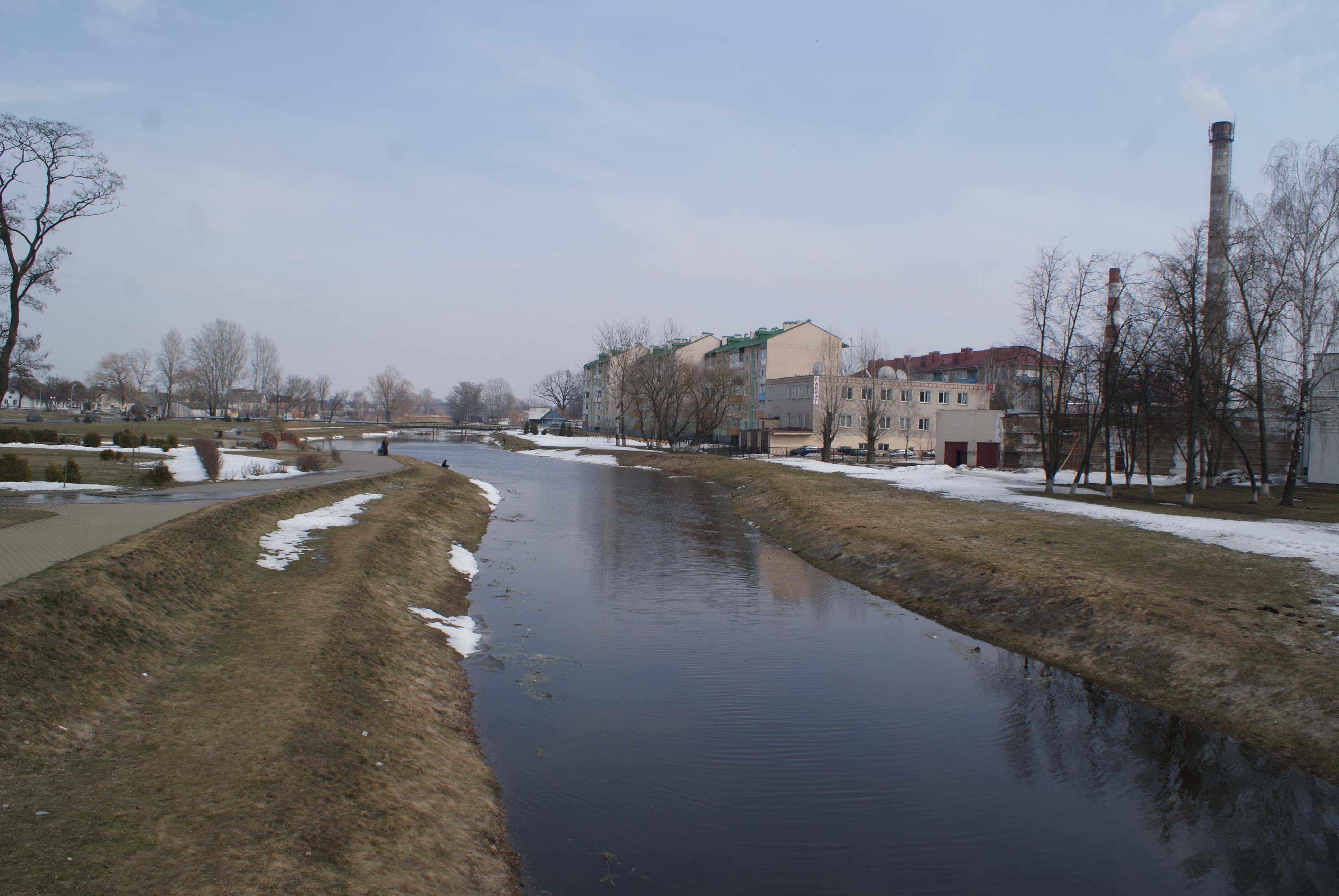 Рака Случ